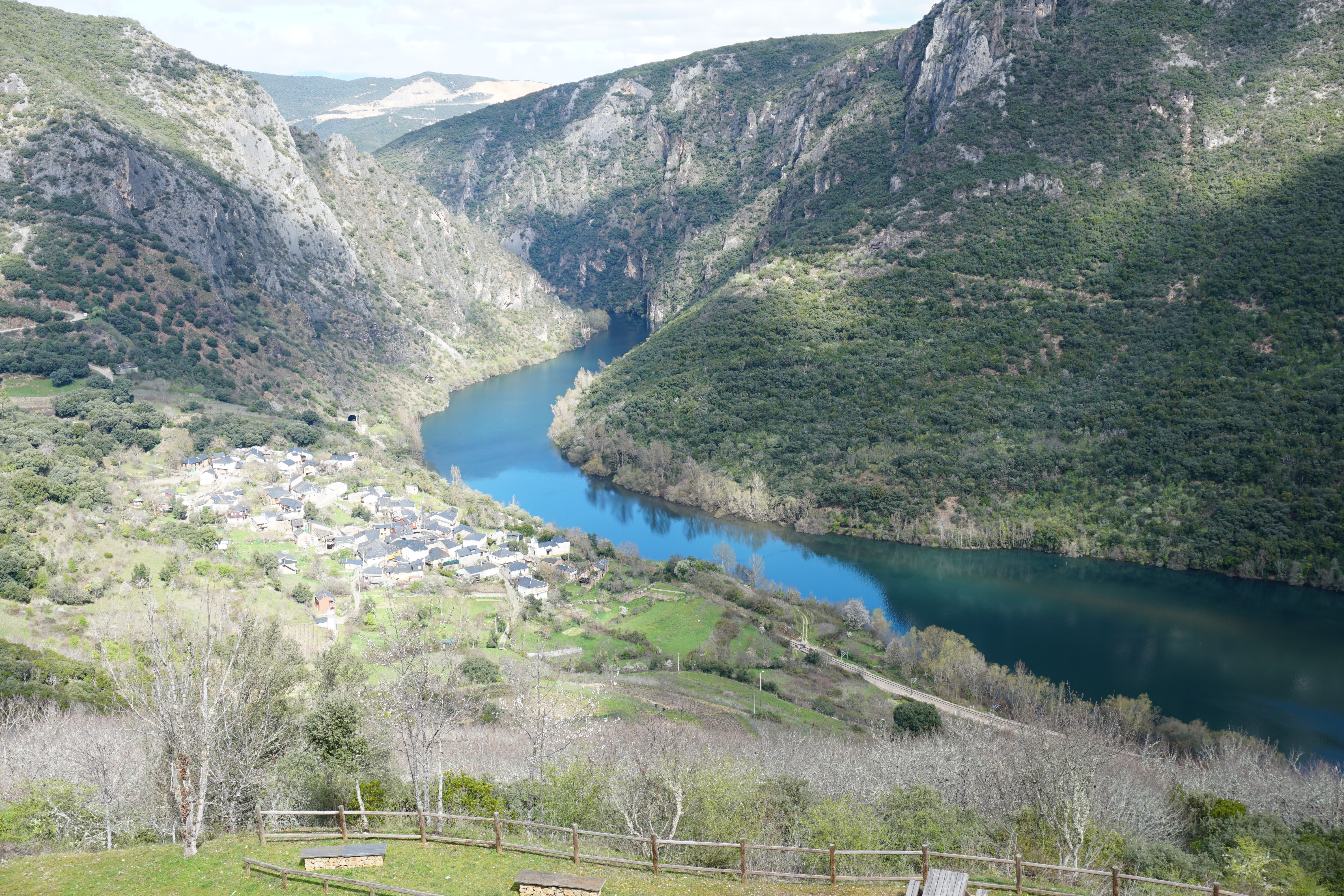 Canón do Sil This is a photography of a Special Area of Conservation in Spain with the ID: ES1120014. Natura2000 entry, EEA entry